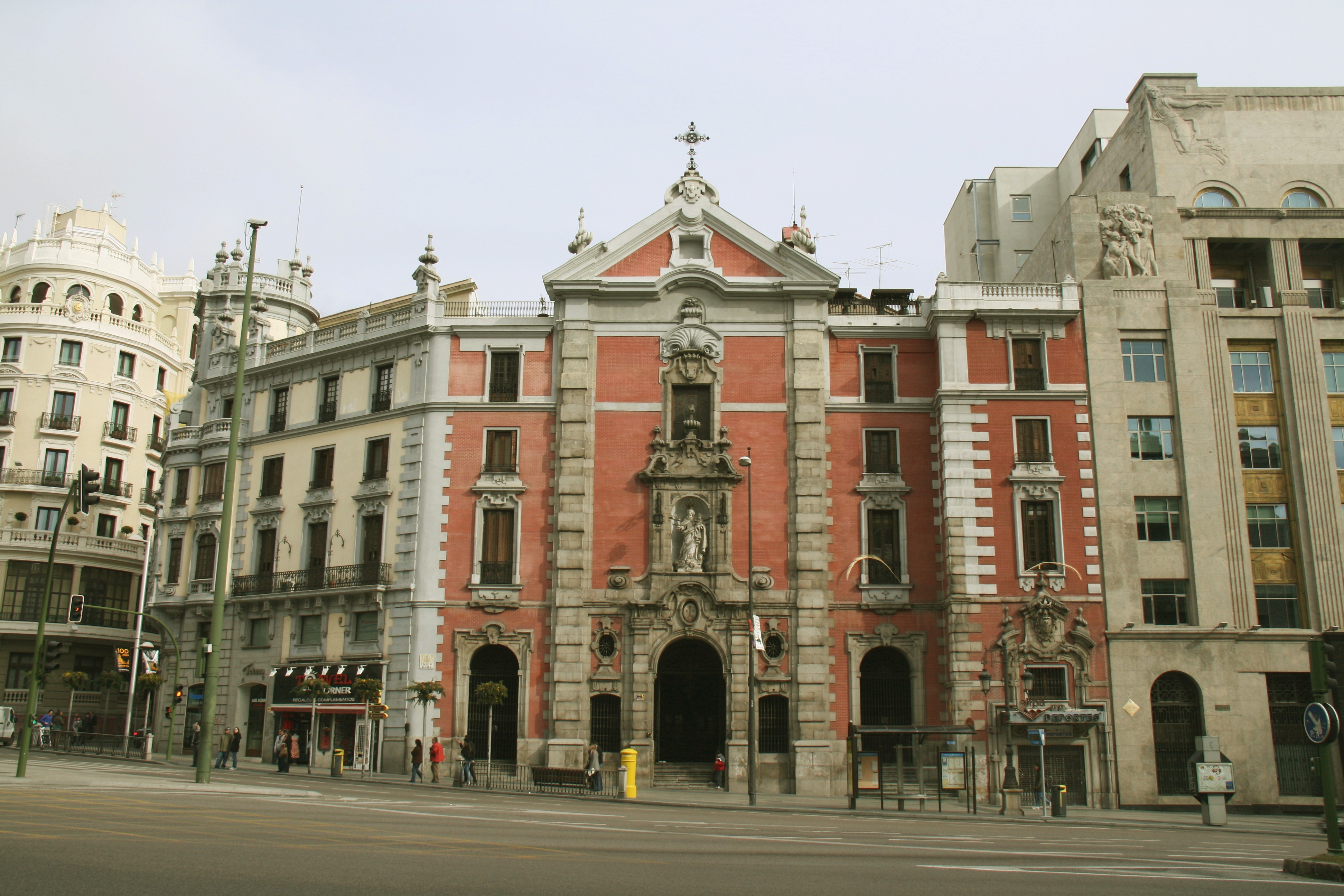 Iglesia de San José (2010)